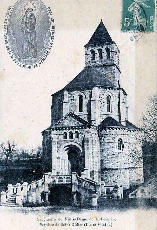 La chapelle Notre-Dame-de-la-Peinière vers 1920 (carte postale d'Edmond Mary-Rousselière)